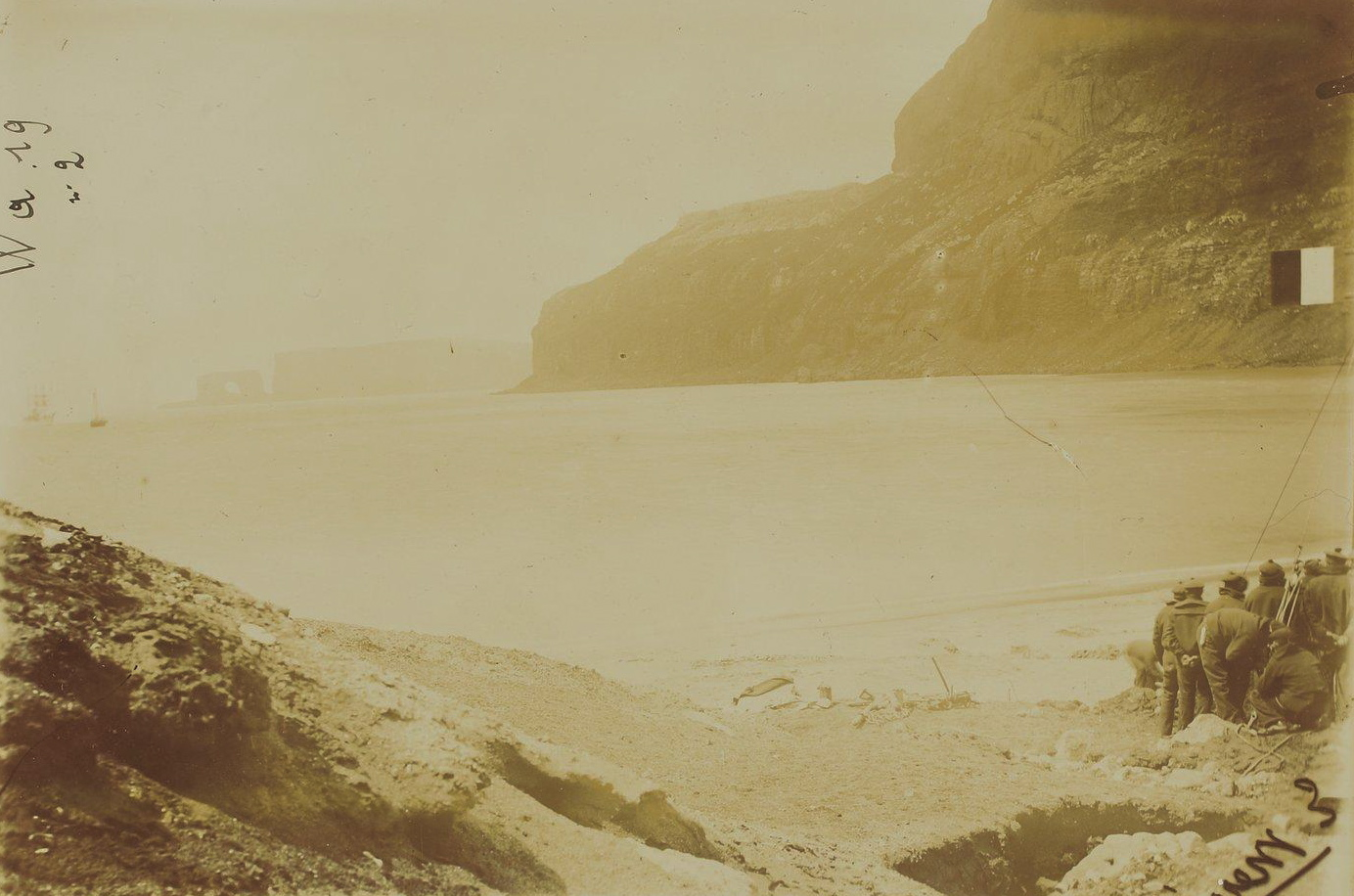 Port-Christmas (île Kerguelen) le 2 janvier 1893. L'aviso-transport française l'Eure commandée par le capitaine de frégate Lieutard et la goélette américaine Francis Allyn de John Fuller sont présents dans la baie de l'Oiseau pour la levée des couleurs lors du renouvellement de la prise de possession solennelle de l'archipel par la France. L'arche des Kerguelen est visible au fond de la baie.